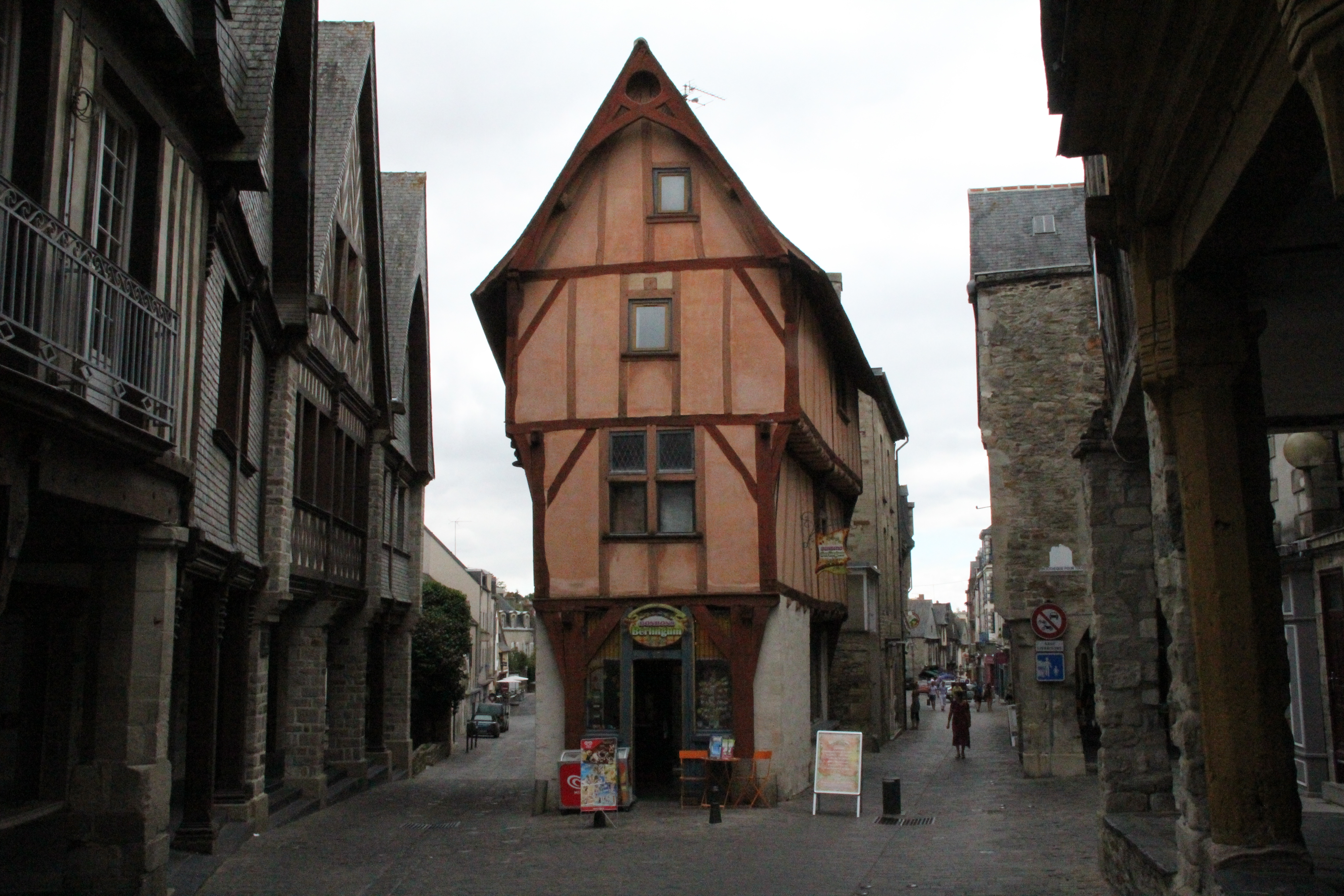 Maison à colombages du 13, rue de la Poterie